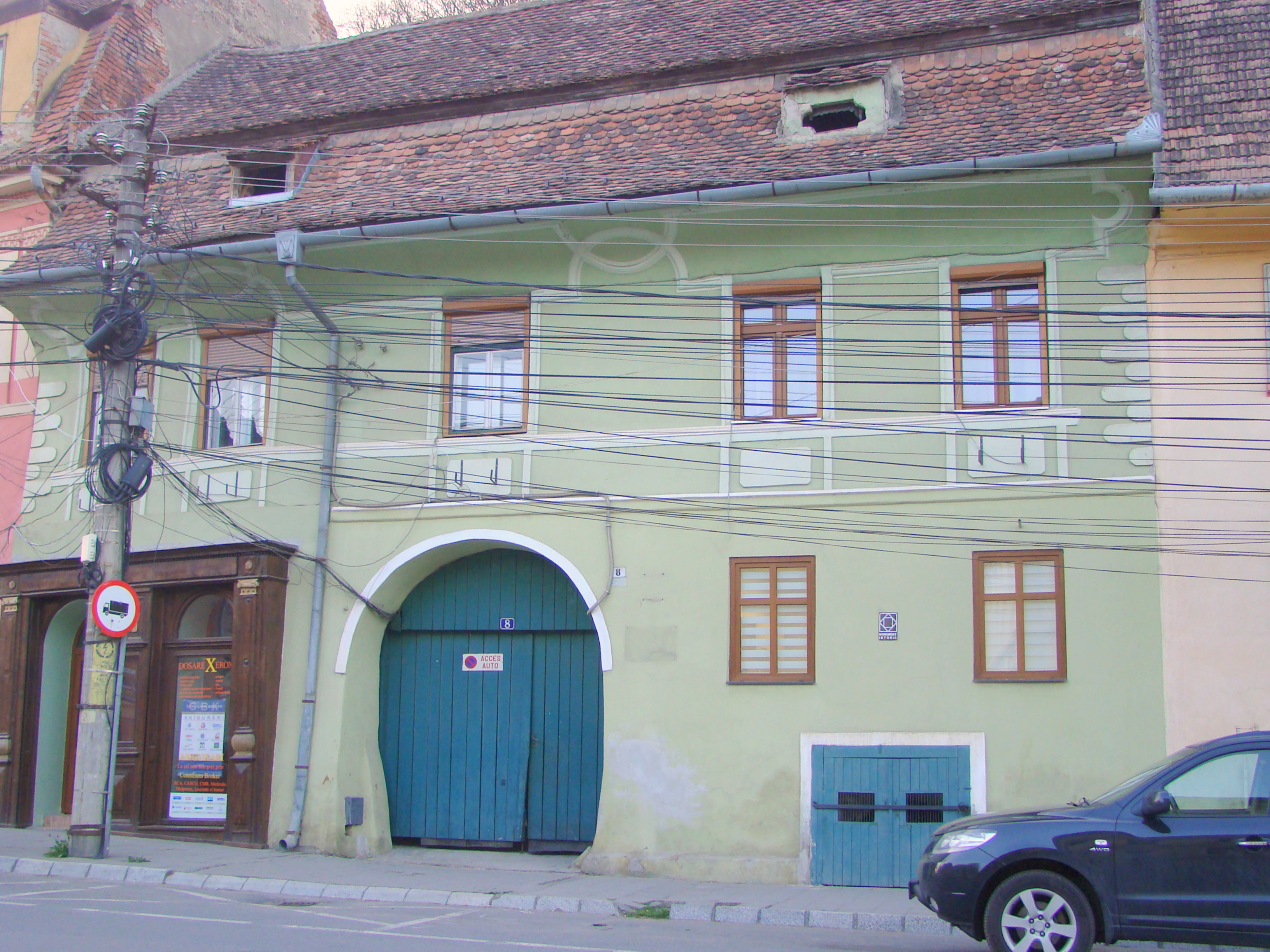 Casă, municipiul Sighișoara, str. Chendi Ilarie 8 1617, sf. sec. XVIII - înc. sec. XIX, 1830